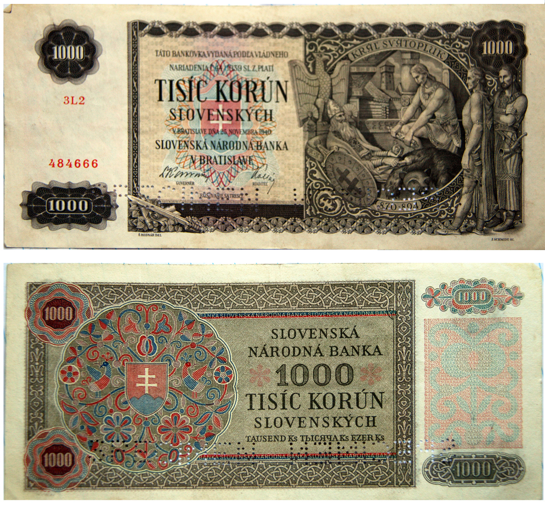 Tisíckorunáčka.Roku 1942 vstúpili do platnosti tisíckorunové bankovky Slovenskej národnej banky podľa návrhu výtvarníka Štefana Bednára a J. Schmidta. Averz: vpravo vyobrazenie kráľa Svätopluka s tromi synmi, vľavo nápis TÁTO BANKOVKA VYDANÁ PODĽA VLÁDNEHO NARIADENIA Č. 44/1939 SL. Z. PLATÍ TISÍC KORÚN / SLOVENSKÝCH / V BRATISLAVE 25. NOVEMBRA 1940 / SLOVENSKÁ NÁRODNÁ BANKA / V BRATISLAVE. Reverz: v ornamentálnom orámovaní vľavo v ružici slovenský štátny znak a vpravo nápis SLOVENSKÁ NÁRODNÁ BANKA / 1000 / TISÍC KORÚN / SLOVENSKÝCH. (Obdobie vojnovej Slovenskej republiky 1939-1944)